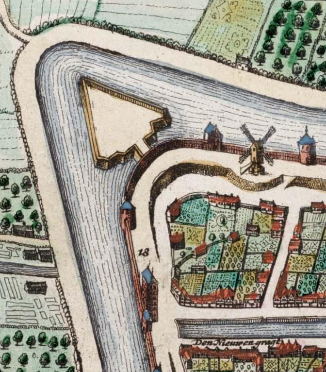 Uitsnede uit stadsplattegrond van Utrecht met voormalige Wolvenburg in 1649. Ook is onder meer de Plompetoren zichtbaar bij de uitmonding van de Plompetorengracht in de Stadsbuitengracht. Oost ligt boven in dit kaartdeel.